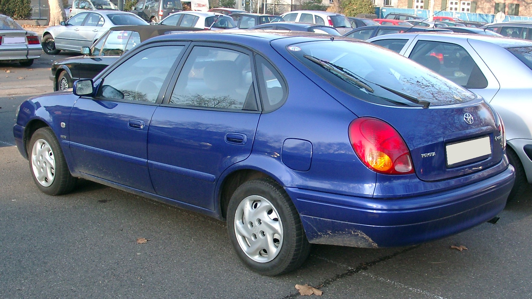 Toyota Corolla E11